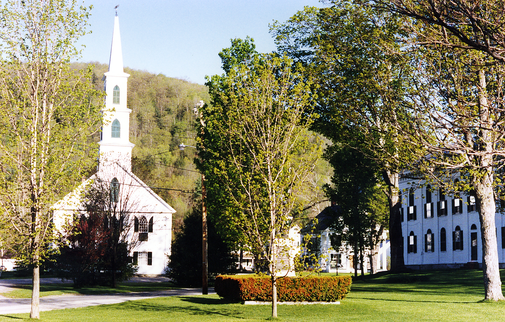 Newfane, Vermont